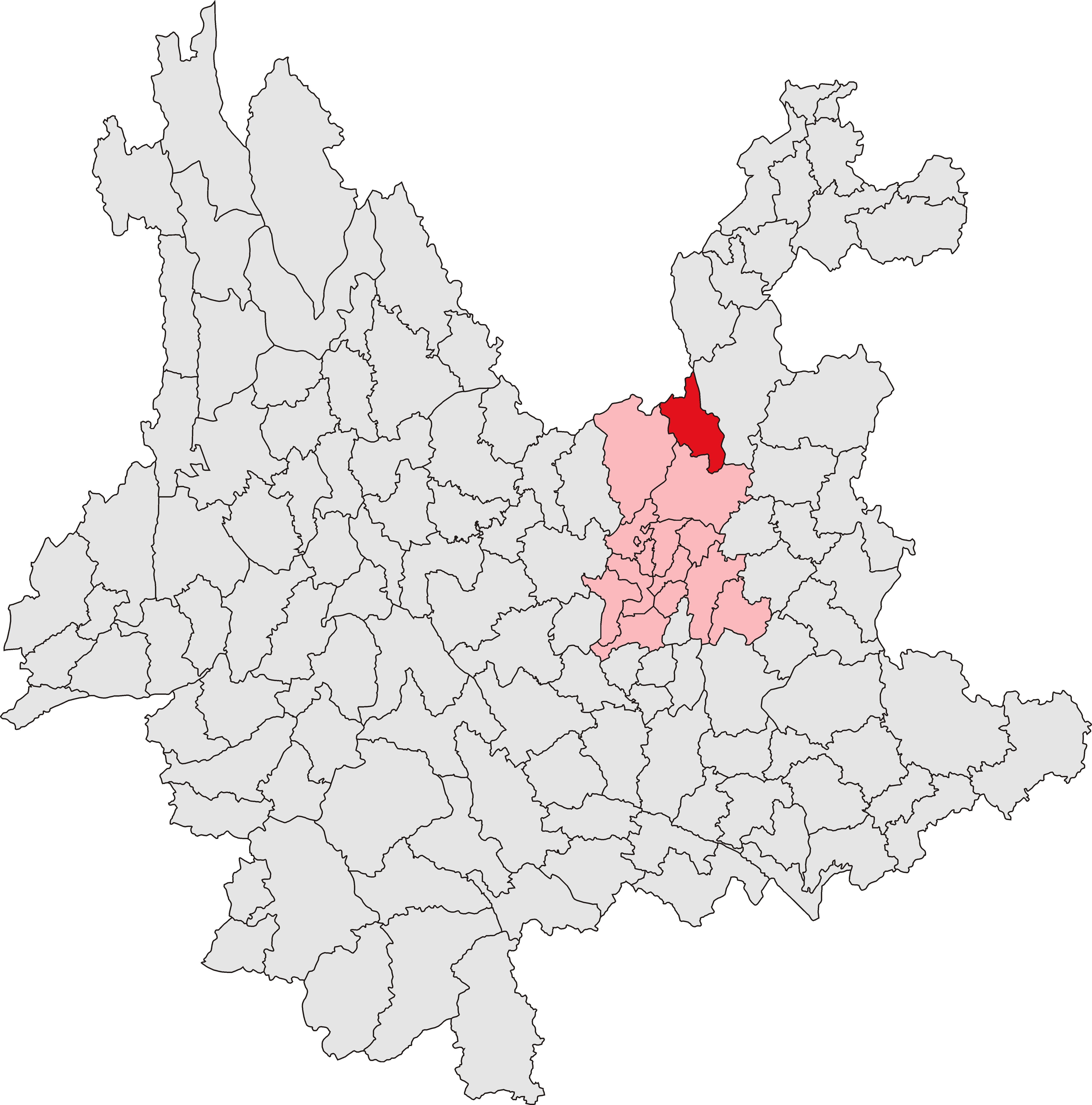 东川区位置图